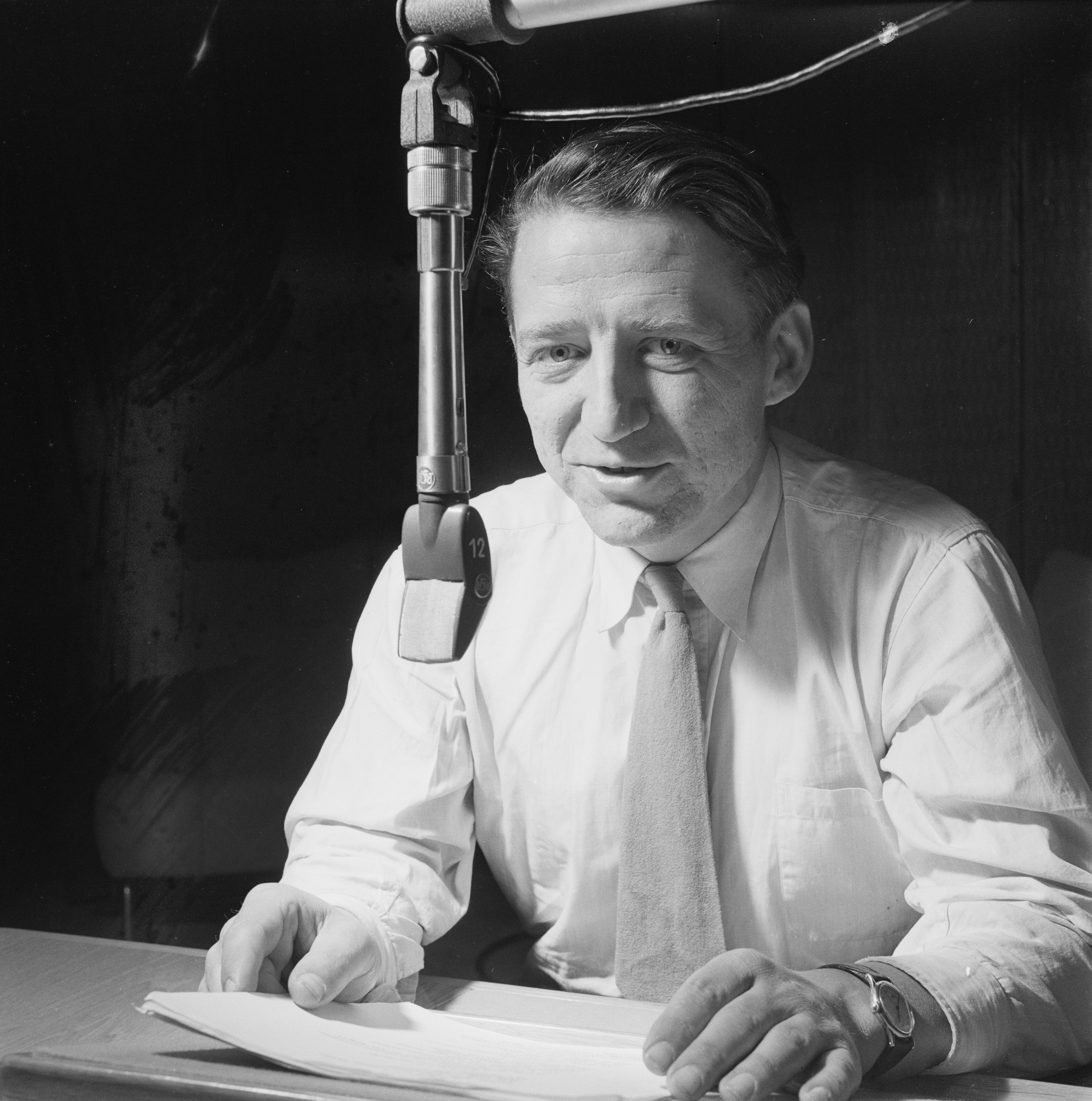 Bildet er hentet fra Arkivverket. Portrett av Thorbjørn Egner. Foto tatt i forbindelse med reportasje om Barnetimen for de minste i Billedbladet NÅ i 1952. NÅ nr. 23 Arkivinstitusjon : Riksarkivet Arkivnavn : Billedbladet NÅ Sted : Norge, Oslo, Oslo, Emneord: Portretter, Barnetimen for de minste, Radiostudio, Radio, NRK, Norsk Rikskringkasting, Mikrofon, Forfattere, Tegnere Avbildet: Egner, Thorbjørn